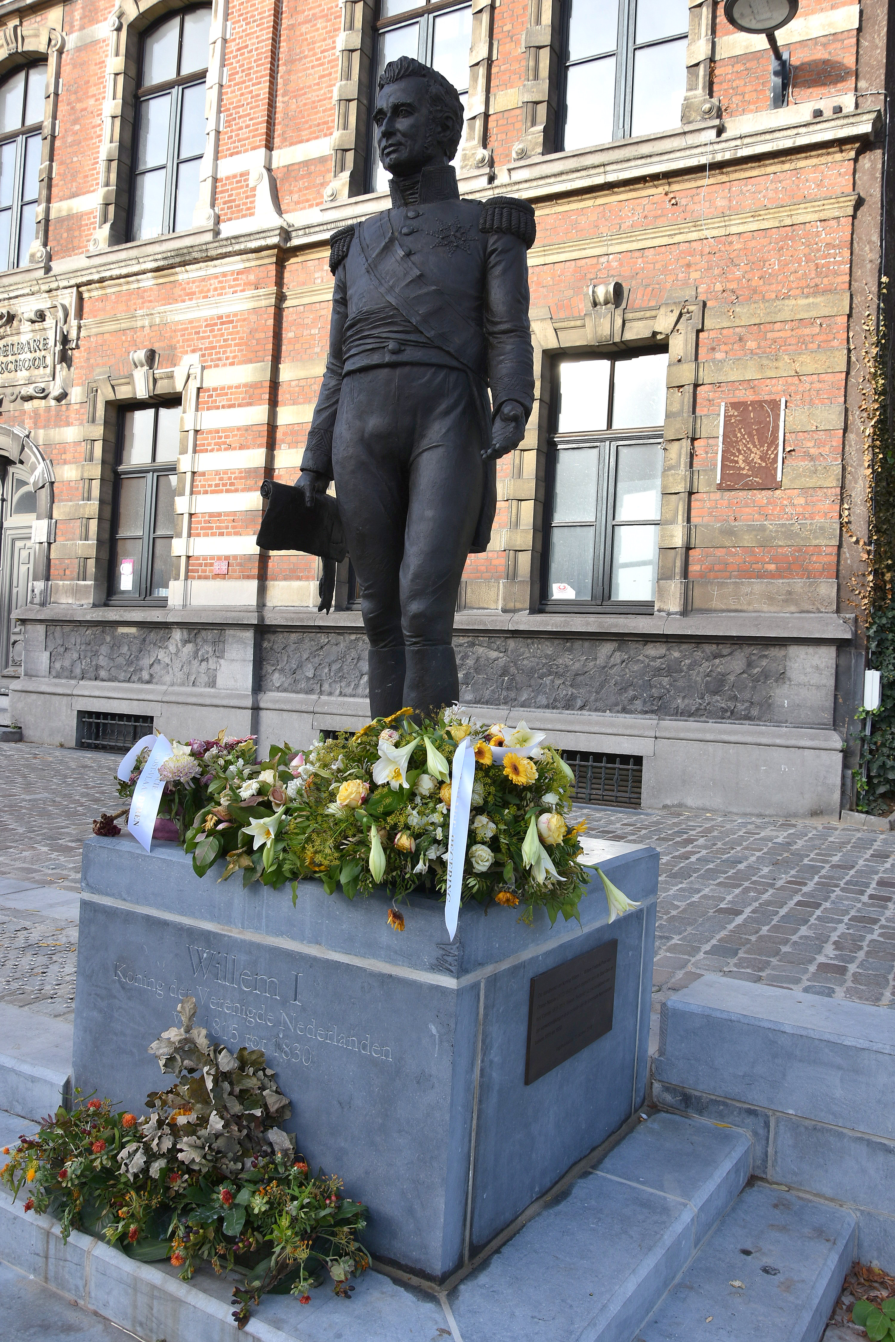 Guy Du Cheyne Standbeeld Willem I der Nederlanden Gent 3-11-2018 This photo of immovable heritage has been taken in the Flemish Region